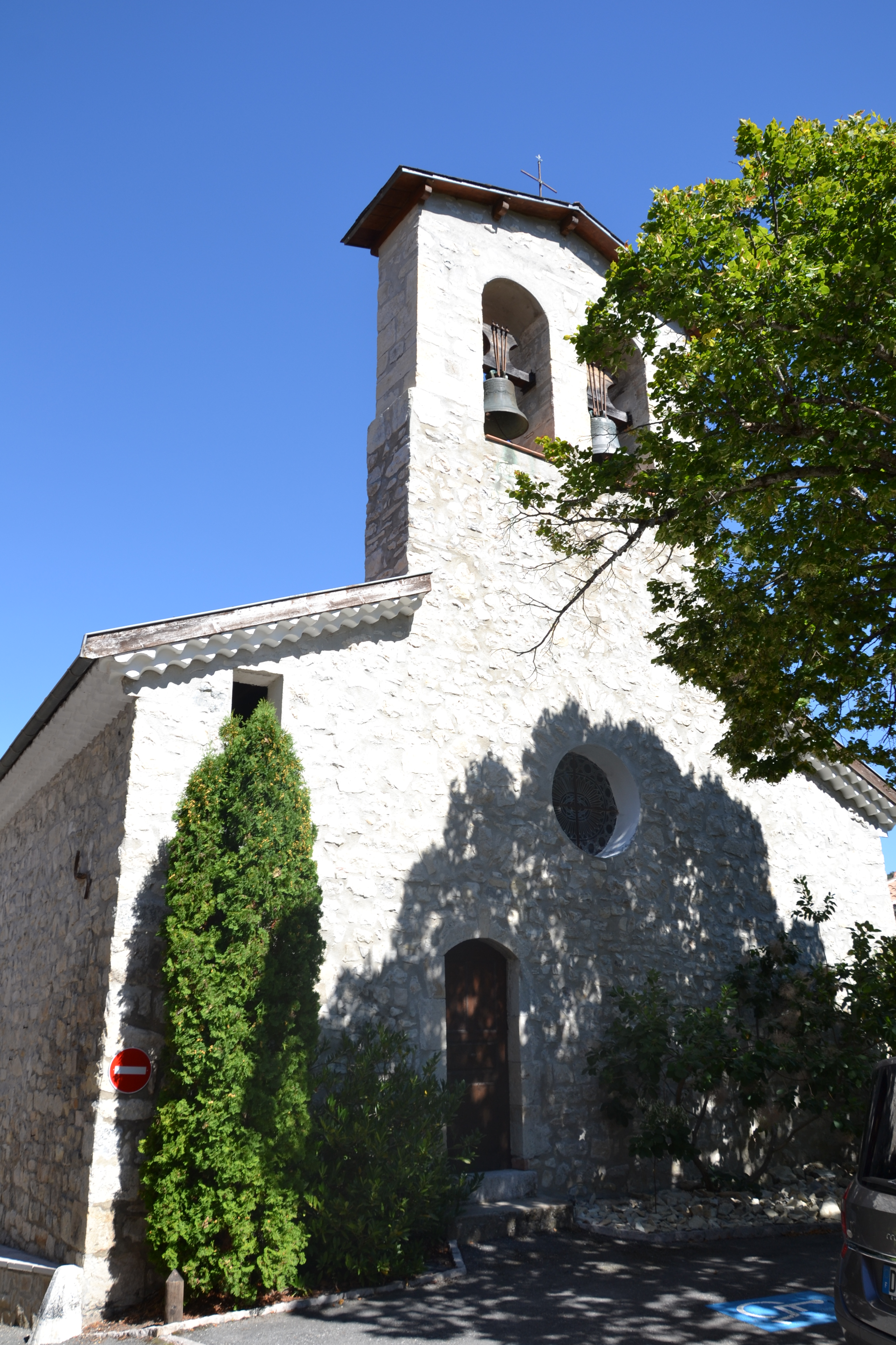 église à Laborel